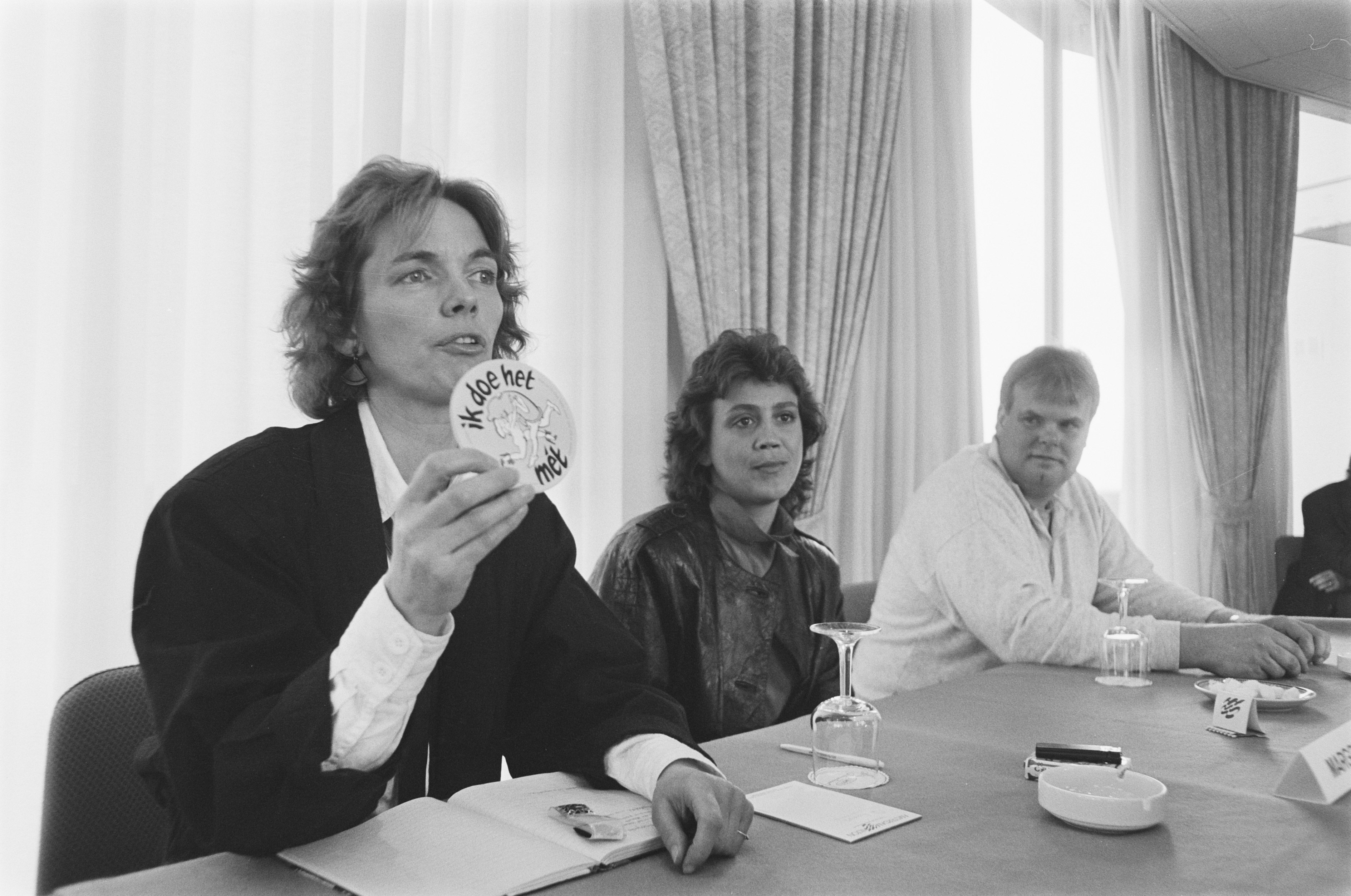 Start van de stickeractie De Rode Draad (de belangenvereniging voor prostituees) voor het gebruik van condooms tegen AIDS; woordvoersters van de Rode Draad Hansje Verbeek (l) en Margot Alvarez (r) Datum 14 mei 1987